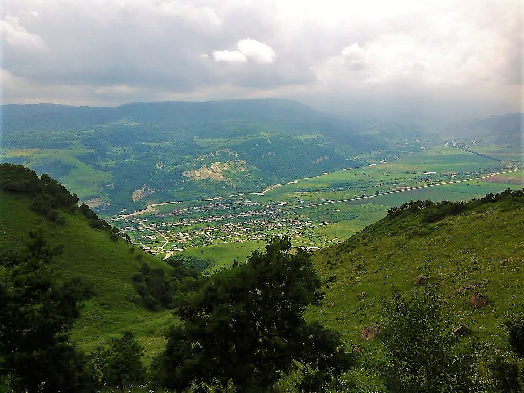 Заюково